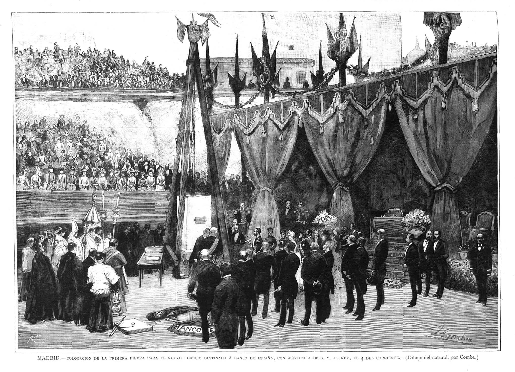 Madrid. — Colocación de la primera piedra para el nuevo edificio destinado a Banco de España, con asistencia de S. M. El Rey, el 4 del corriente, en la revista española La Ilustración Española y Americana.